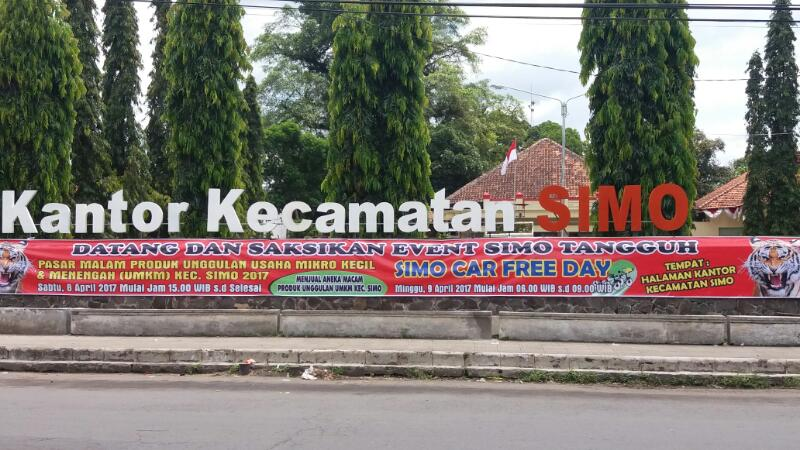 Kantor Kecamatan Simo